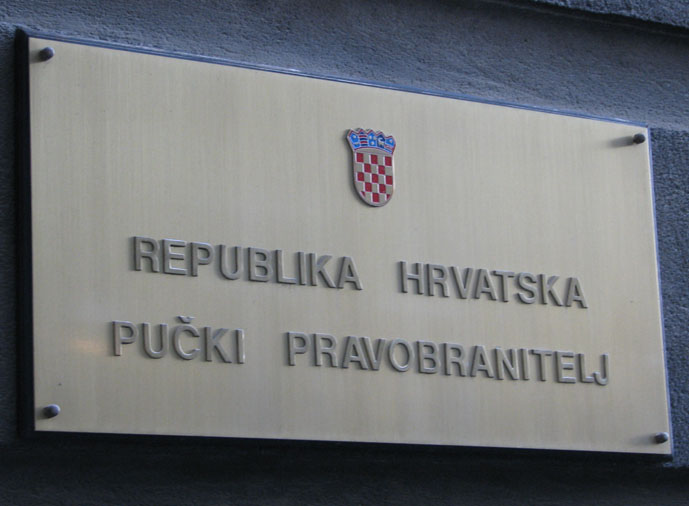 Tabla na ulazu - Pučki pravobranitelj